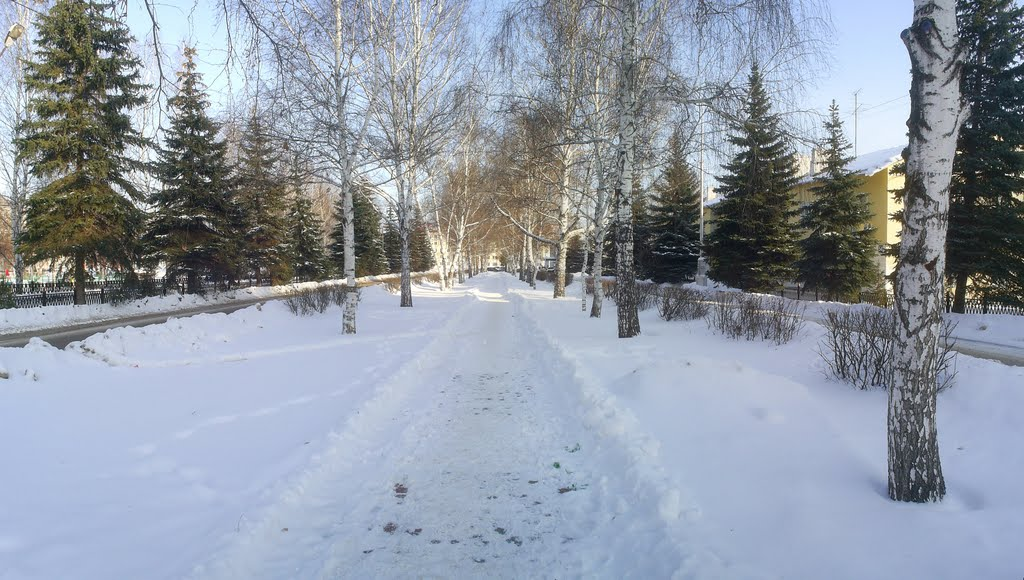 Проспект Ленина, Ишимбай, январь 2012